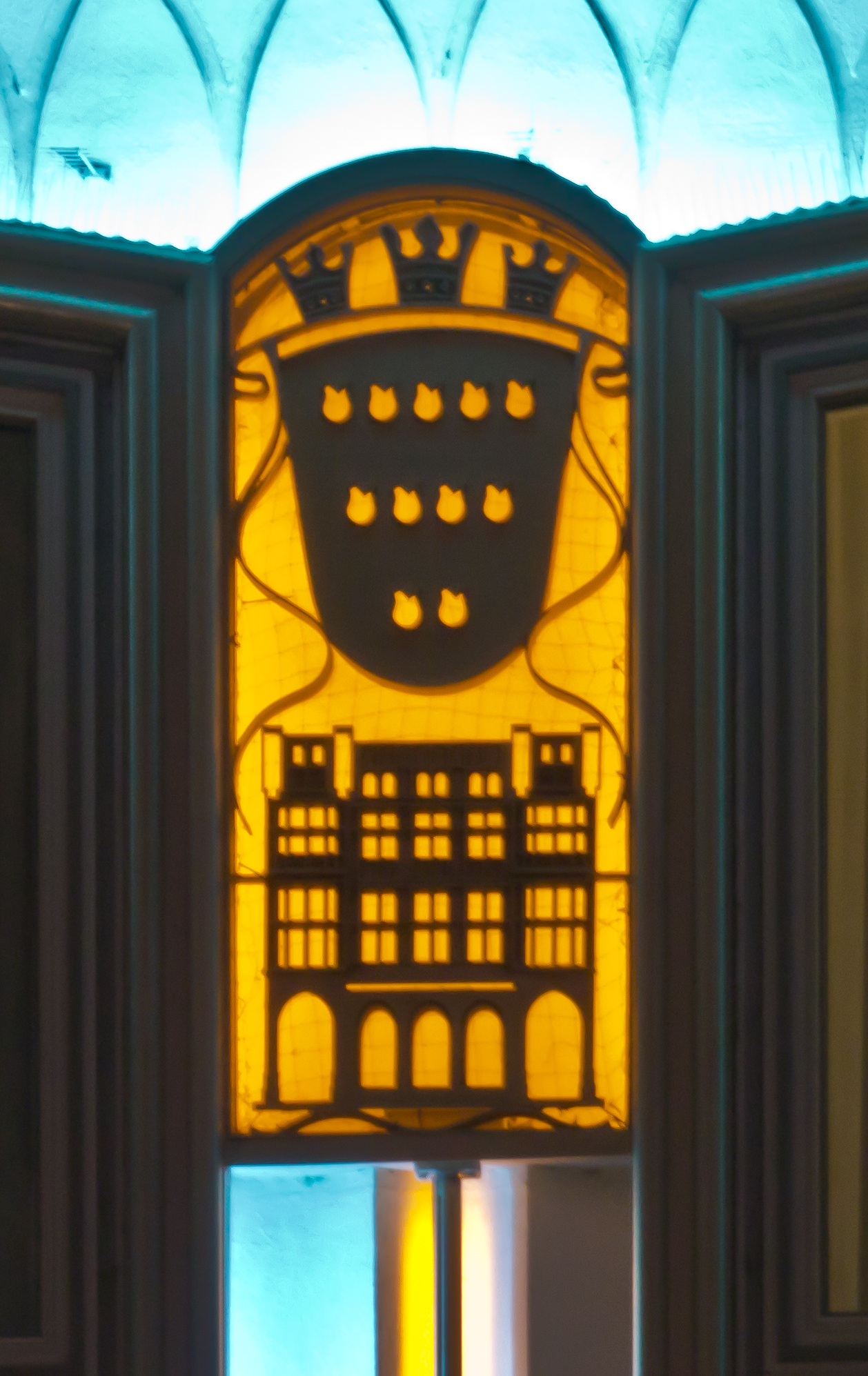 Denkmalgeschütztes Büro- u. Geschäftshaus "Blau-Gold-Haus", Köln. Architekten: Wilhelm Koep und Rudolf Koep, Baujahr: 1952, Bauherr: 4711 Muelhens KG Detail: Säulenabschluss mit Kölner Wappen und dem 4711-Haus in der Glockengasse This is a photograph of an architectural monument.